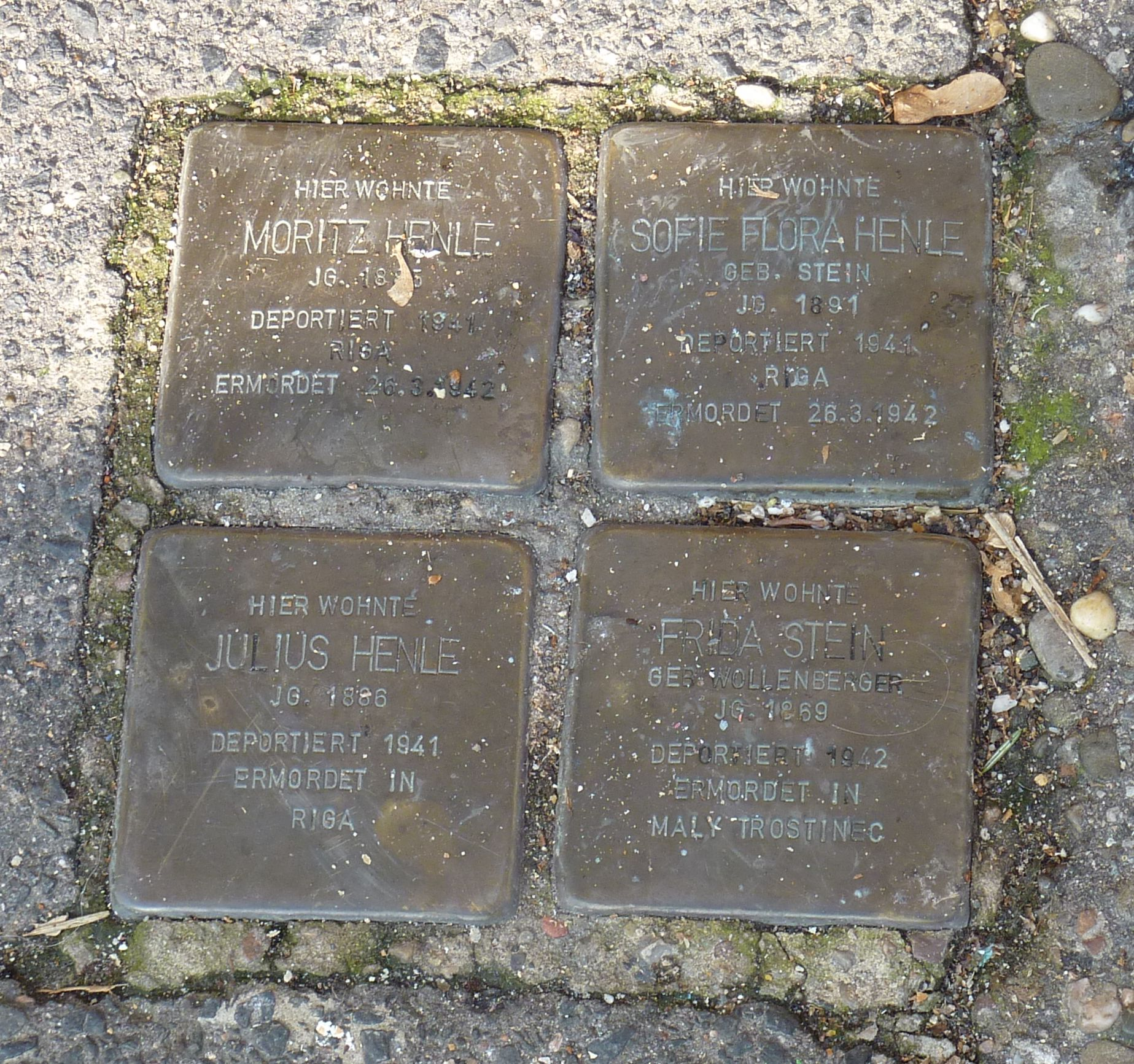 Stolpersteine für Familie Henle und Frida Stein vor der Innsbrucker Str. 31 in Heilbronn